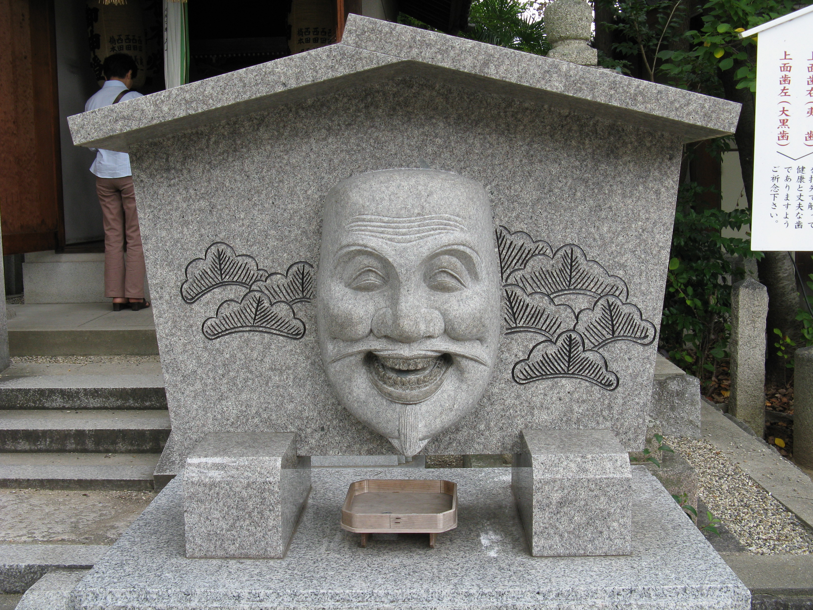 柴籬神社 歯磨き面